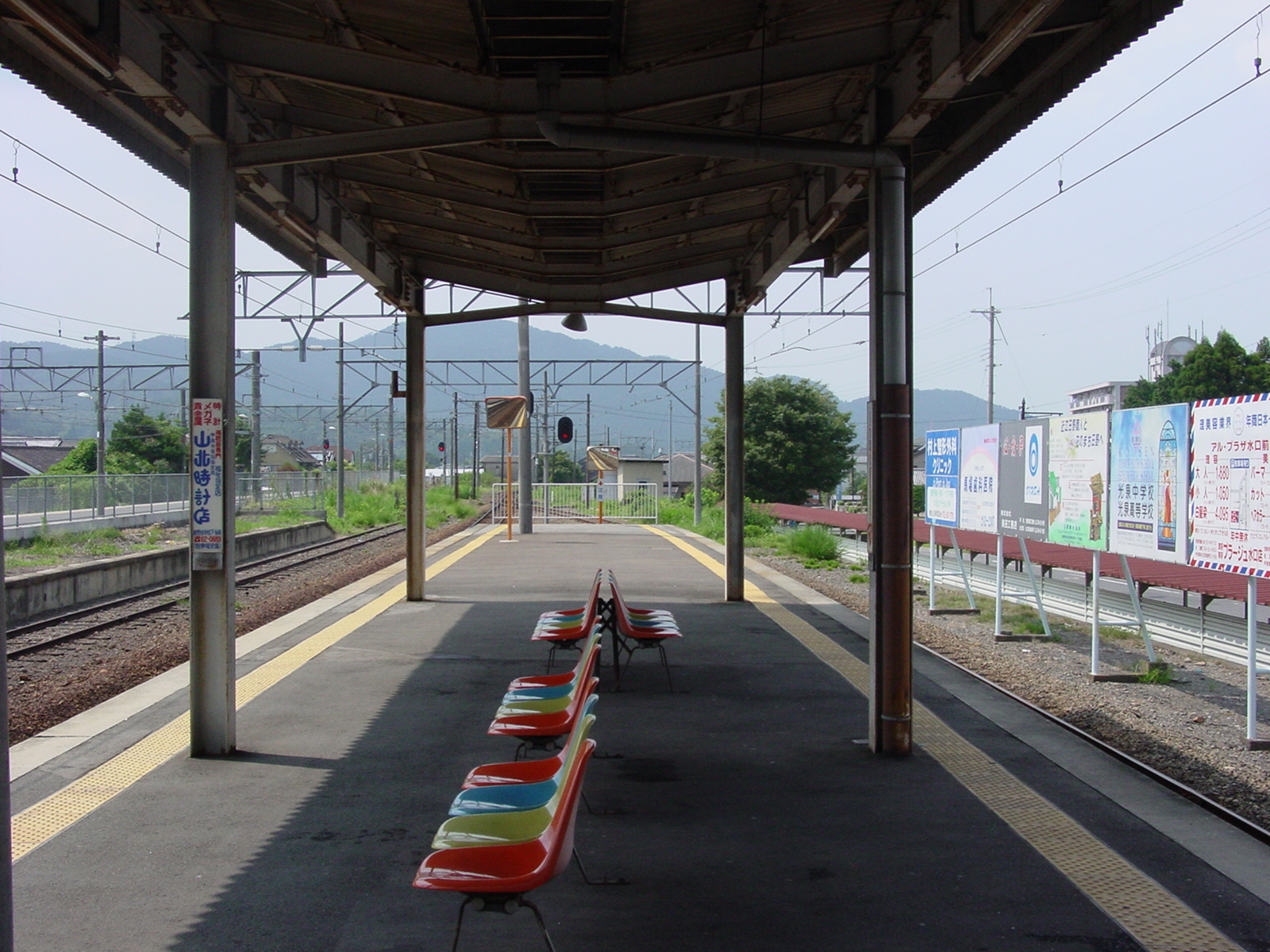 貴生川駅ja:近江鉄道線プラットホーム